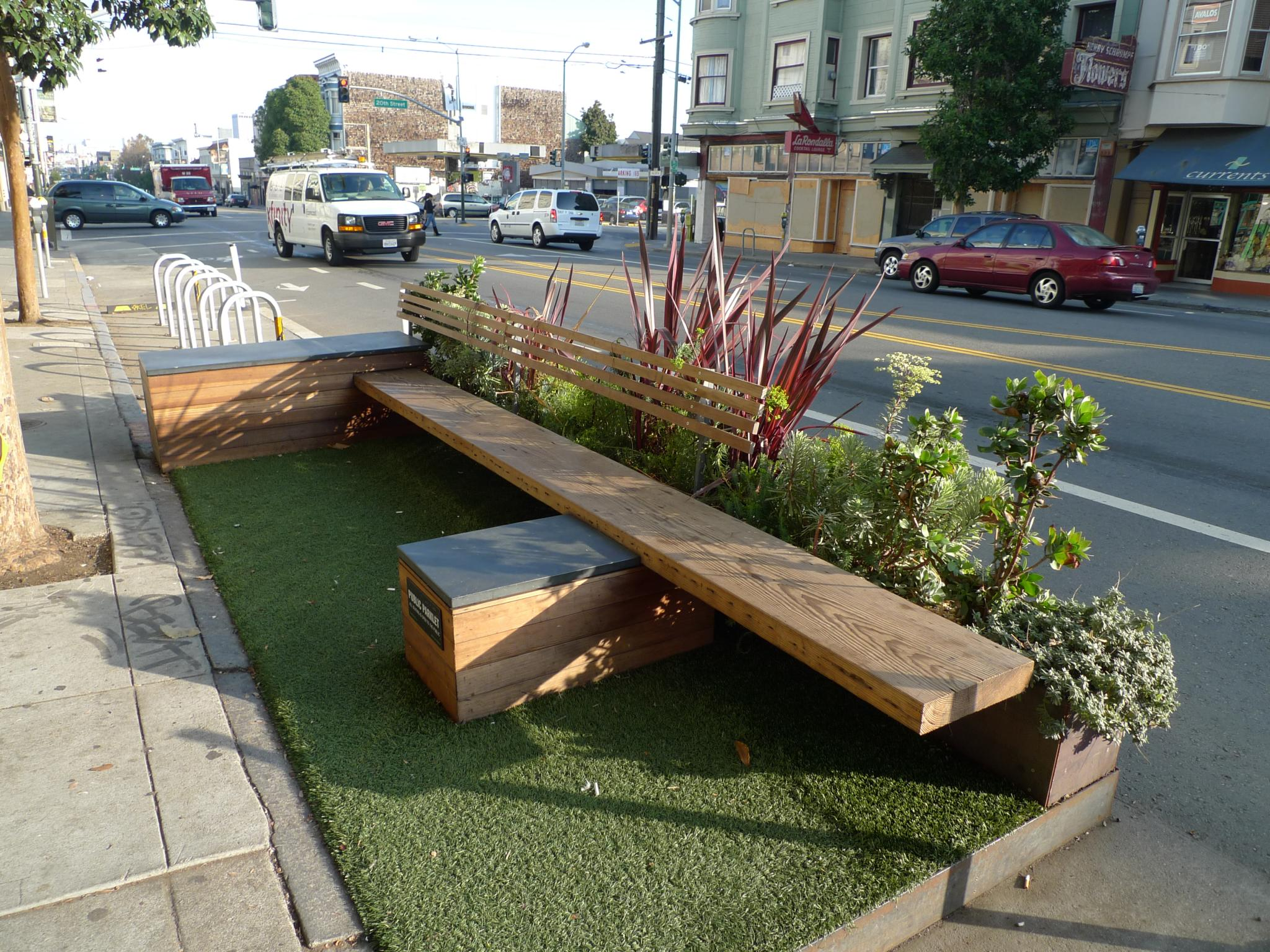 Freewheel Parklet, Valencia Street San Francisco